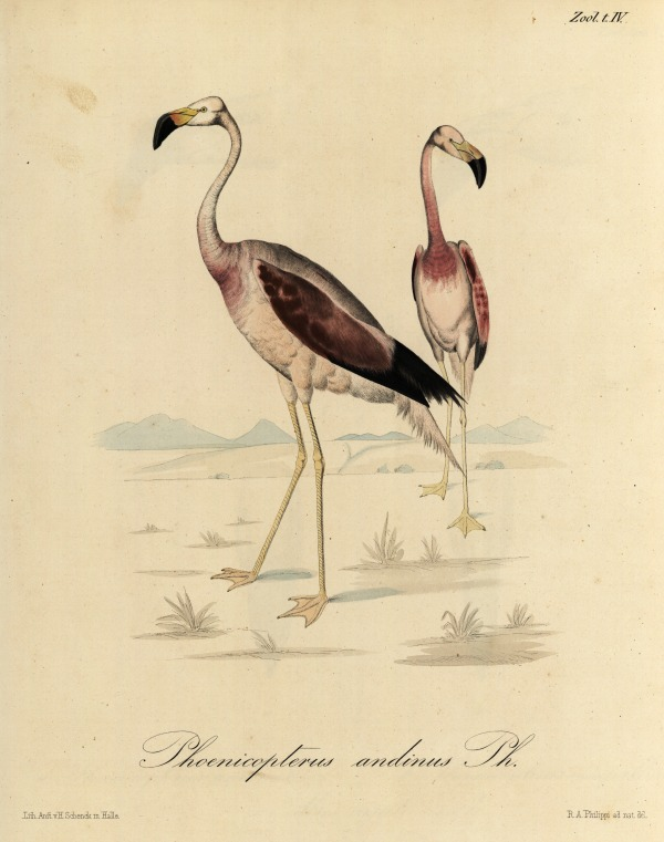 Phoenicoparrus andinus: Flamenco andino, Parihuana, Parina Grande, Jututu, Chururu